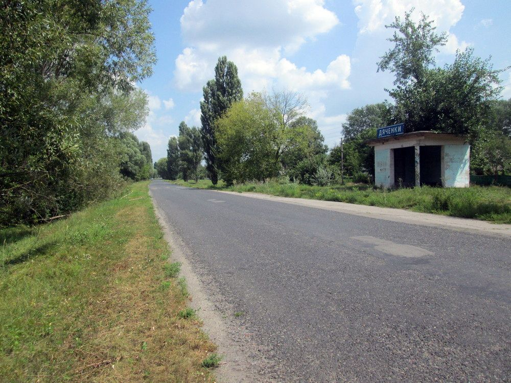 Село Дяченки (Козельщинський район, Полтавська область). Автошлях Т 1736